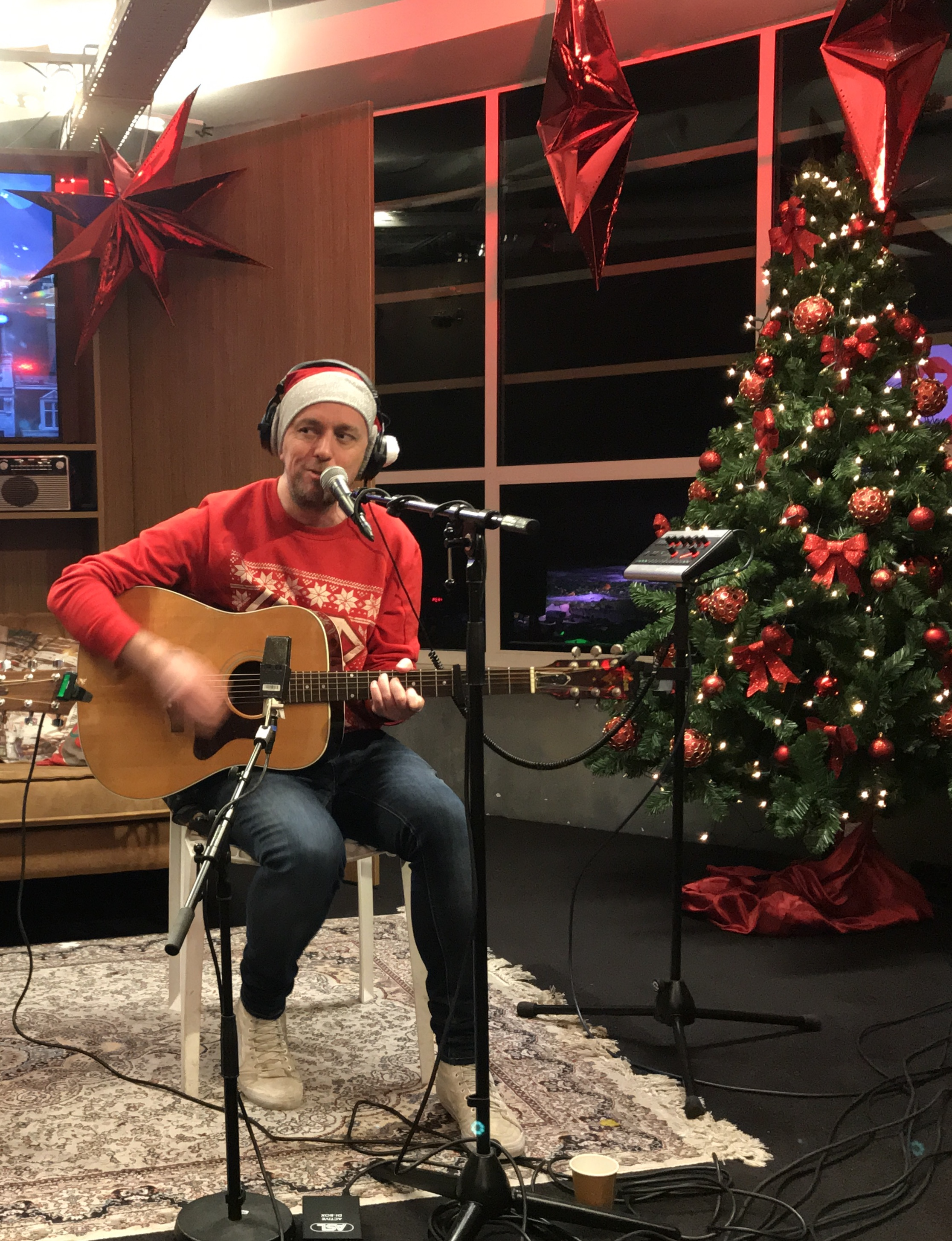 A Balladeer (Marinus de Goederen) aan het optreden bij de Roodshow Late Night NPO Radio 2.